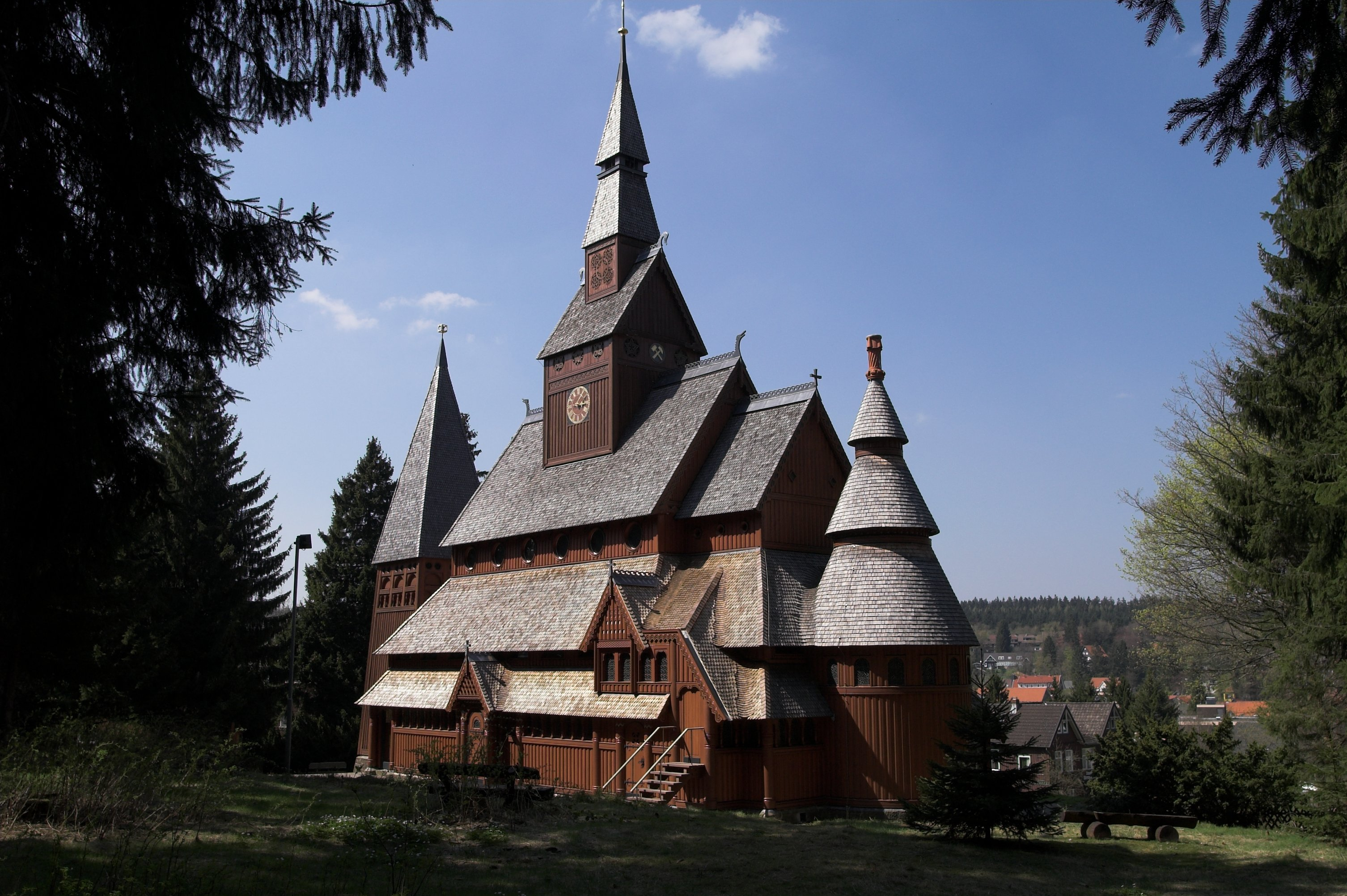 Südseite der Stabkirche in Hahnenklee